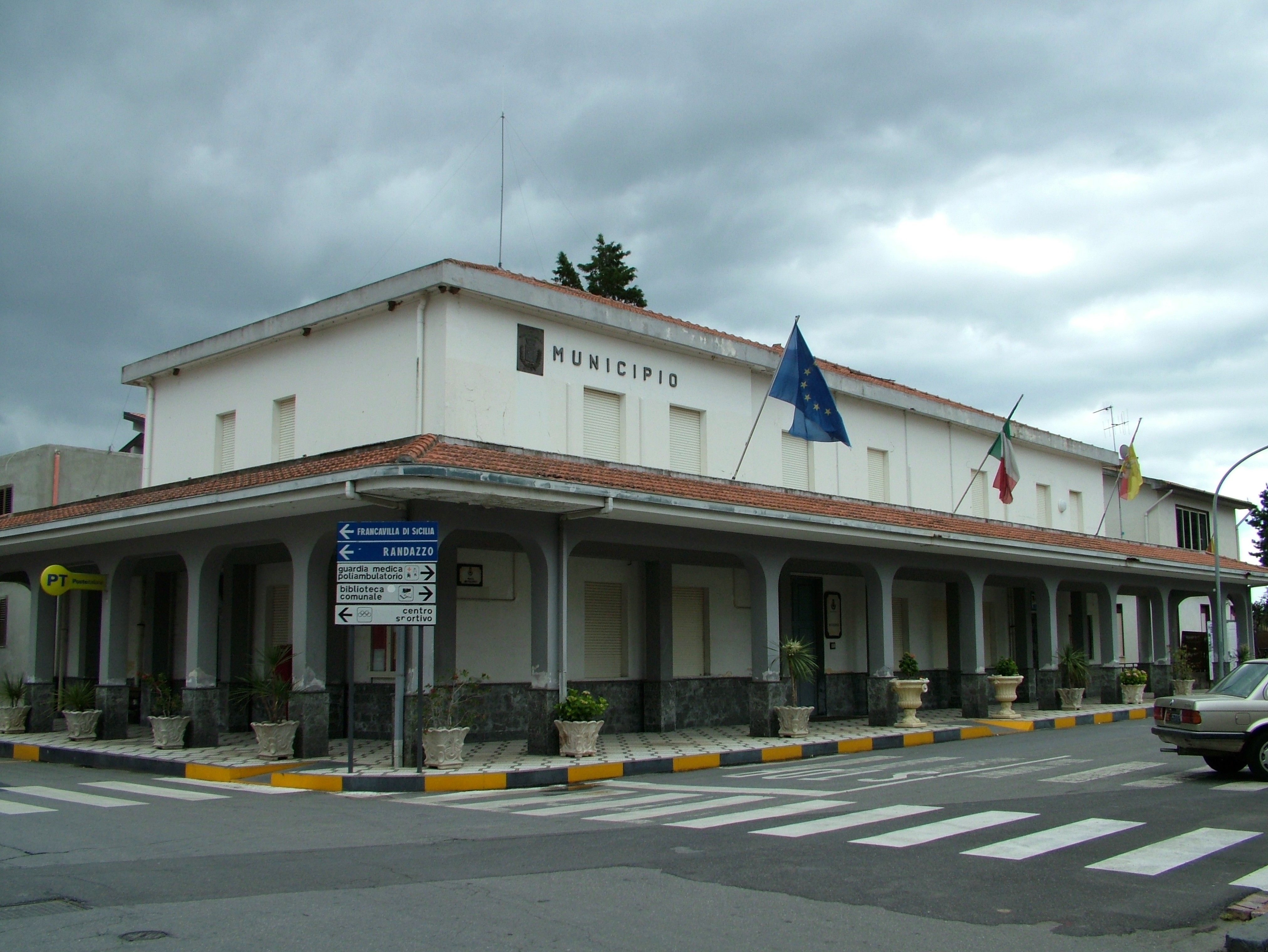 Moja Alcantara, Sizilien, Rathaus